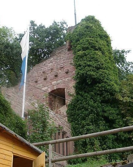 La burgo Clingenburg en la urbo Klingenberg (Bavario) Dato: la 8-an de majo 2006